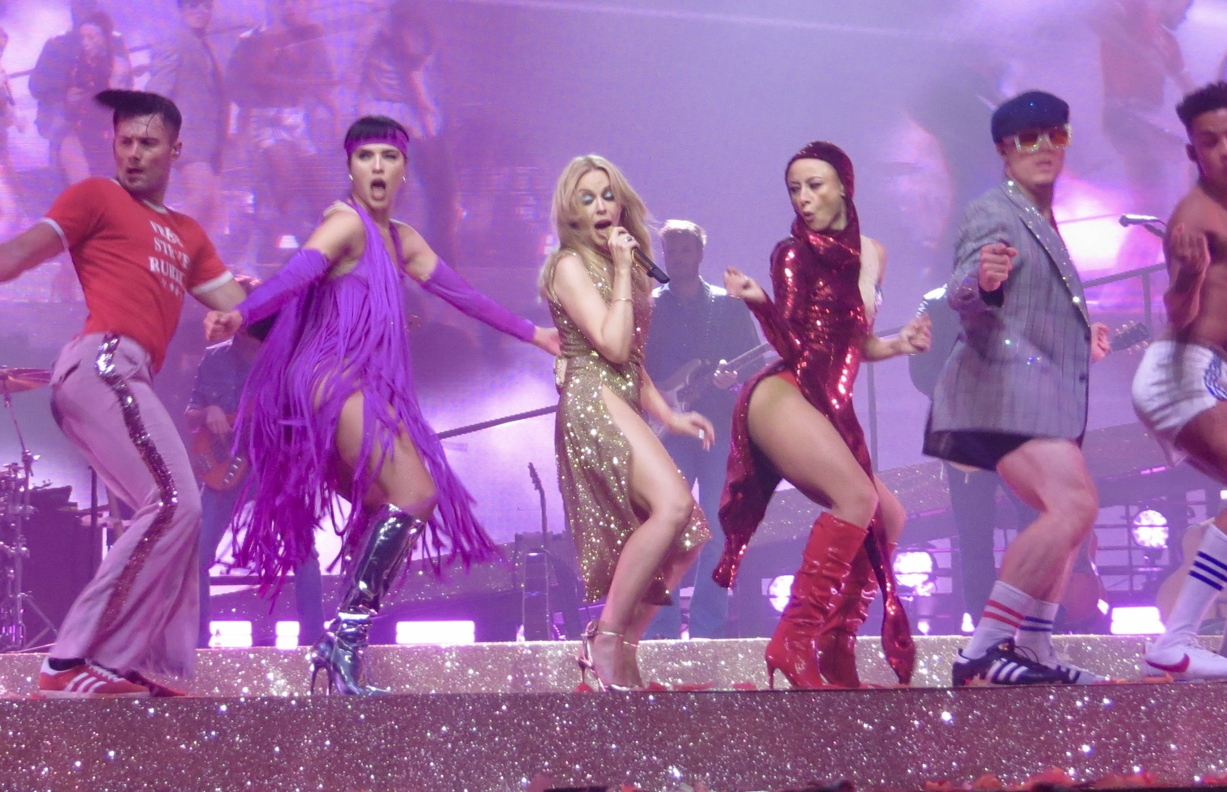 Kylie Minogue 10